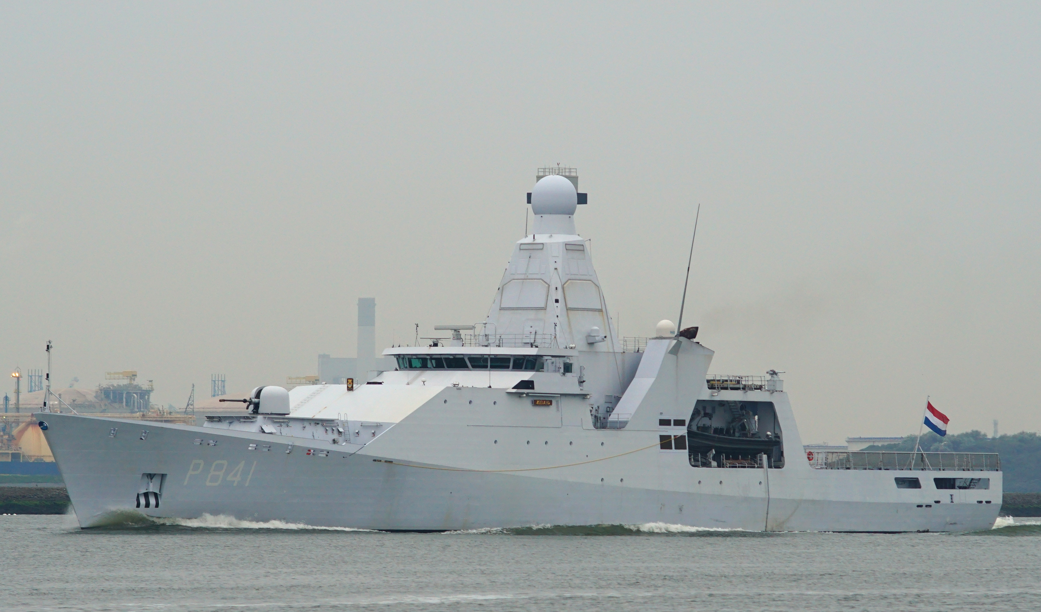 Nieuwe Waterweg 4-9-2014. Deelnemer aan de Wereldhavendagen in Rotterdam 5 .6 & 7 september 2014